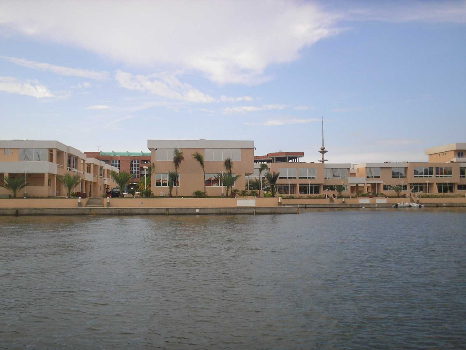 Una de las urbanizaciones más famosas de la ciudad de Lechería, estado Anzoátegui.